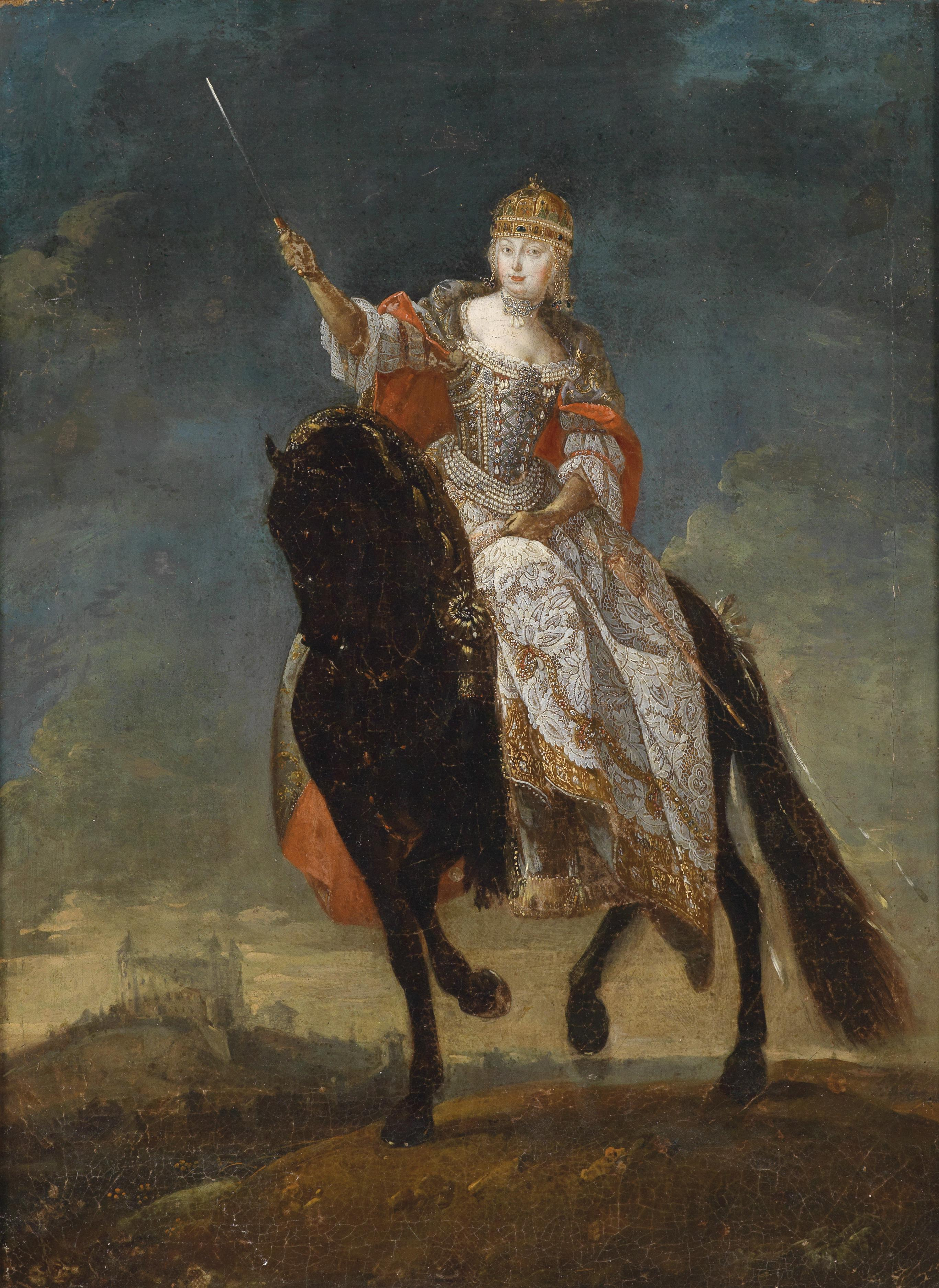 Maria Theresia als Königin von Ungarn auf dem Krönungshügel zu Preßburglabel QS:Lde,"Maria Theresia als Königin von Ungarn auf dem Krönungshügel zu Preßburg"